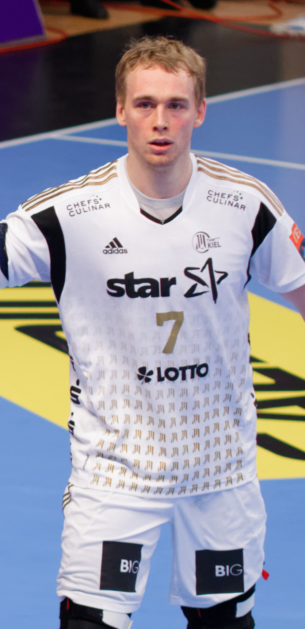 Rencontre de phase de groupe de la ligue des champions 2016-17 entre le PSG et le THW Kiel. A Coubertin, le 12 mars 2017.